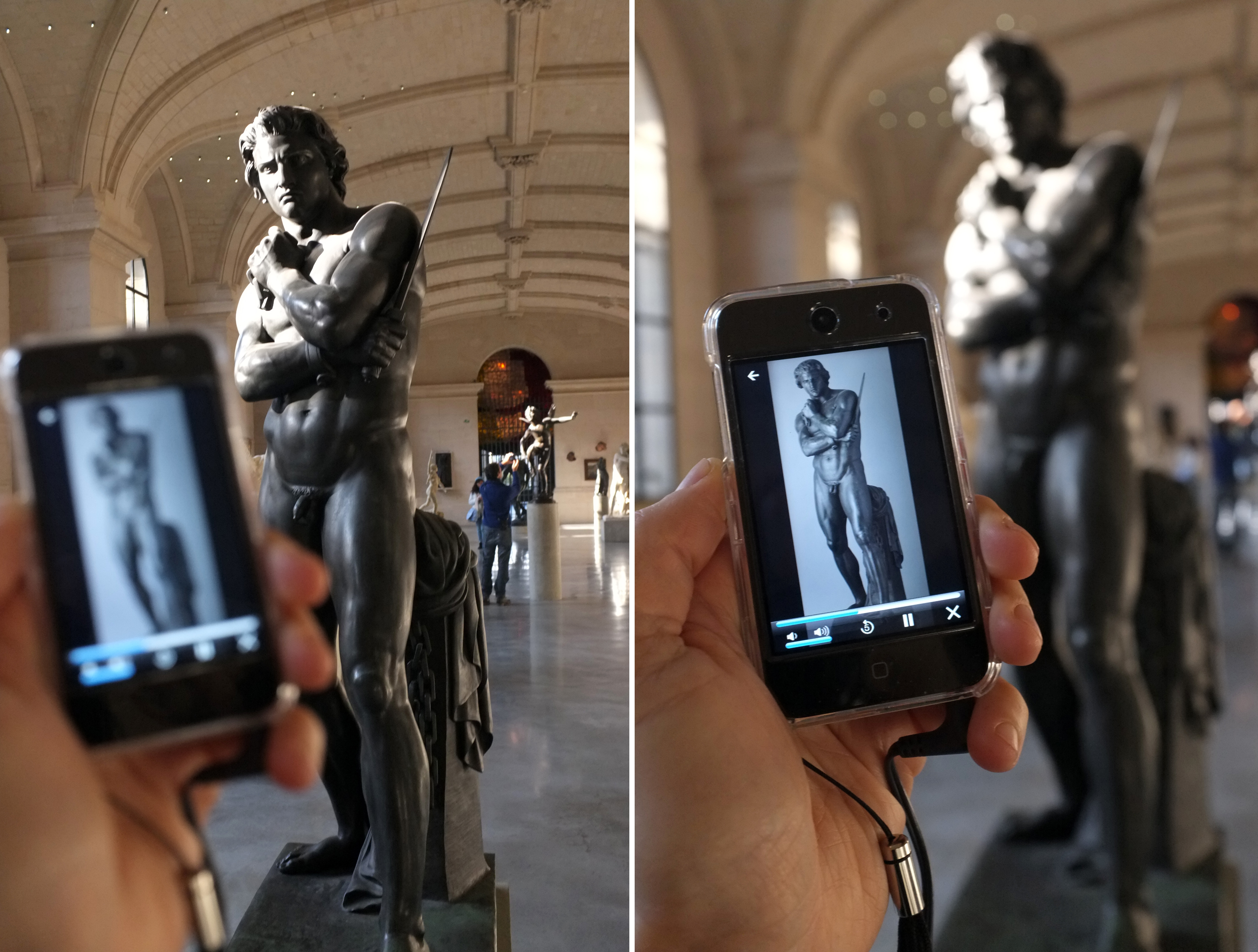 Montage avec audioguide et floutés ; "Spartacus brisant ses liens", sculpture de Denis Foyatier datée de 1847